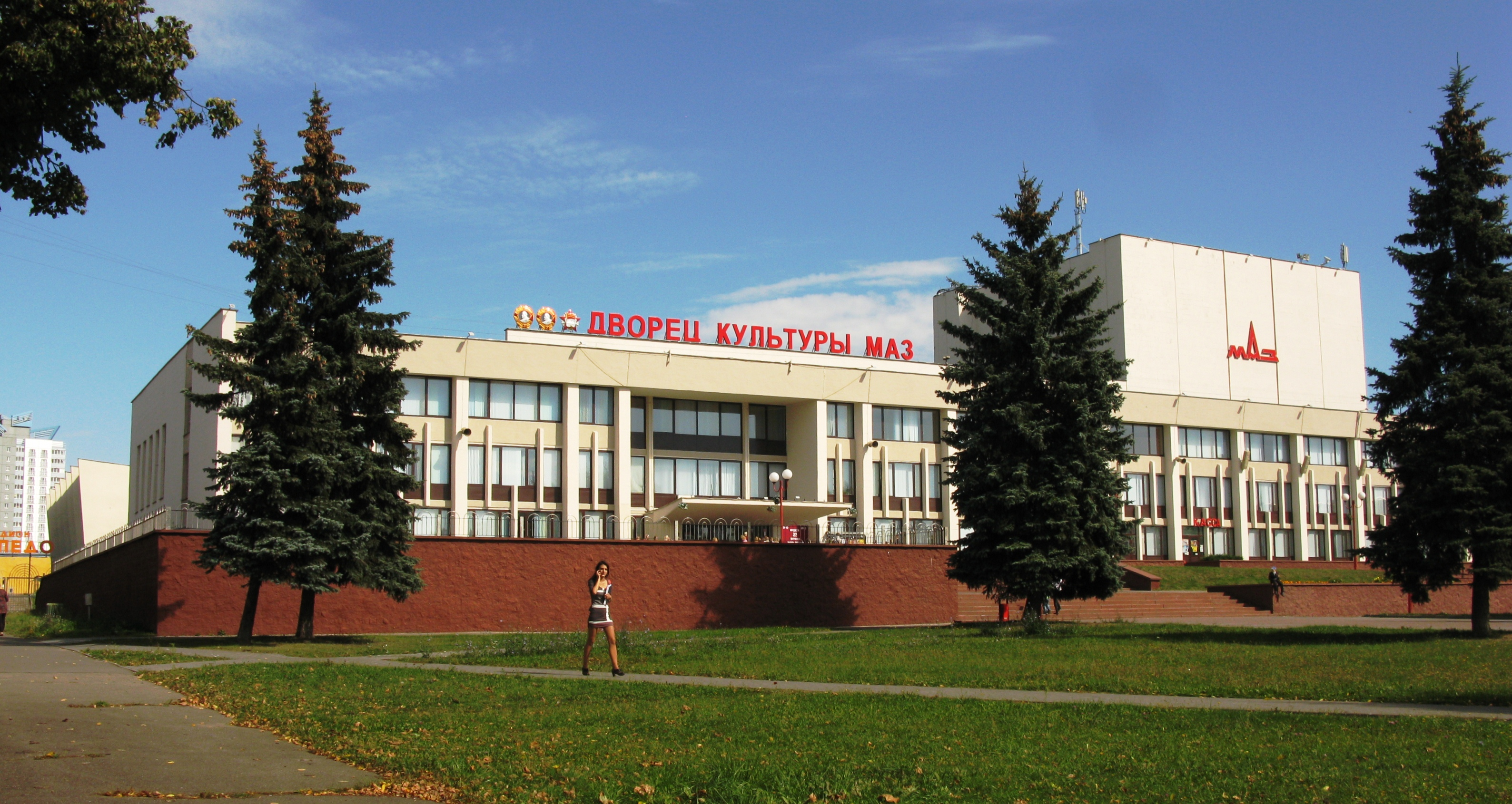 Вид Дворца культуры МАЗ с Партизанского проспекта. Минск, Беларусь.